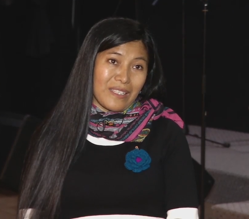 Consuelo Jerí (cantante peruana)